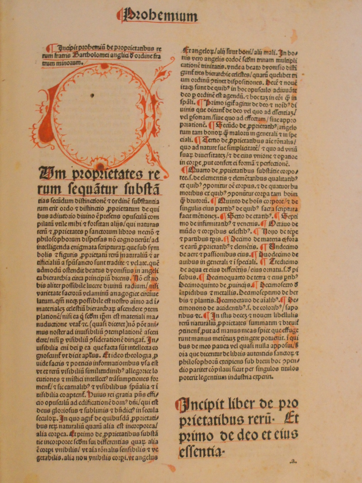 Petrus Hungarus, De proprietatibus rerum, Inkunabel, gedruckt in Lyon 1482